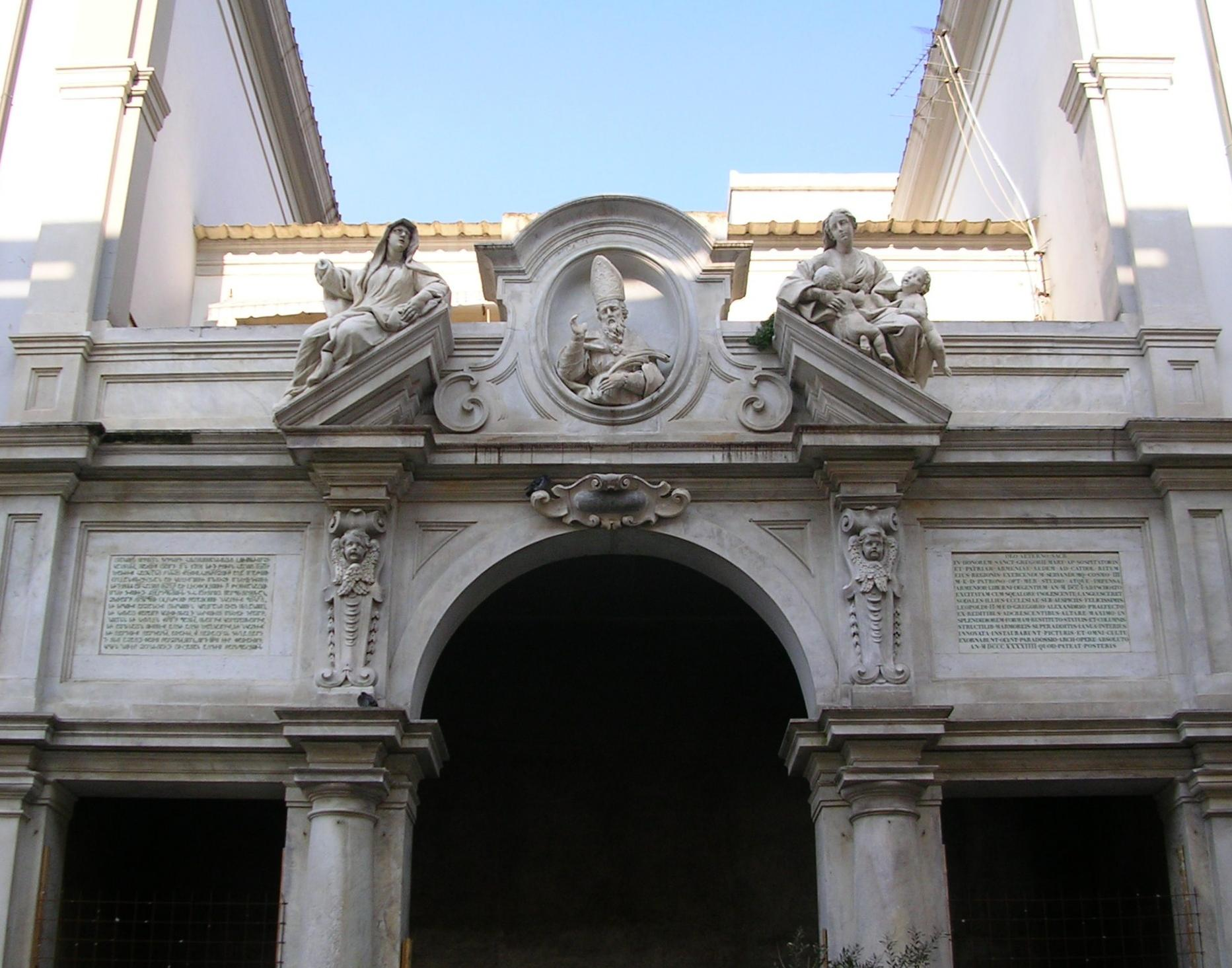 Livorno: la chiesa armena di San Gregorio Illuminatore (XVIII secolo), il luogo di culto cattolico della comunità armena presente in città fino alla seconda guerra mondiale. Oggi resta solo la facciata, dopo che la chiesa, danneggiata dai bombardamenti del 1943, è stata abbattuta nel dopoguerra.